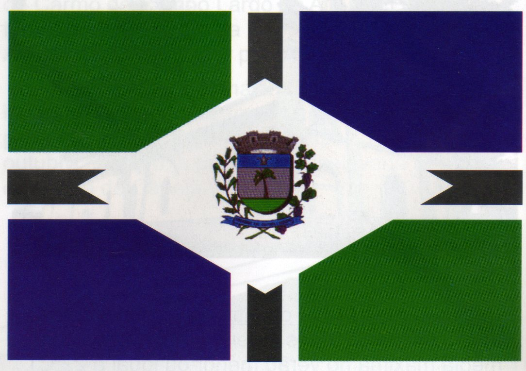 Bandeira do Município de Jarinu